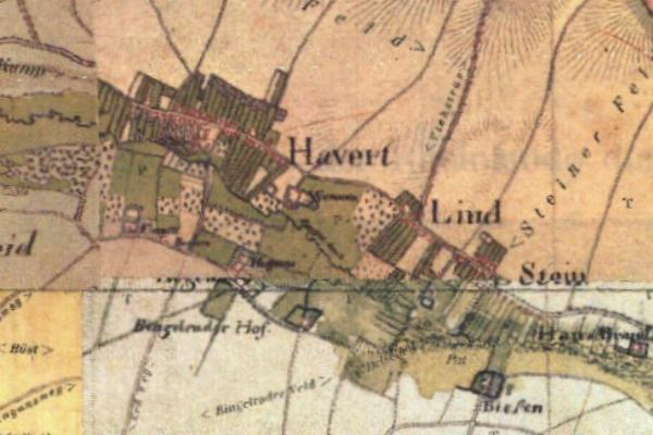 Kartenaufnahme der Rheinlande 1804/05